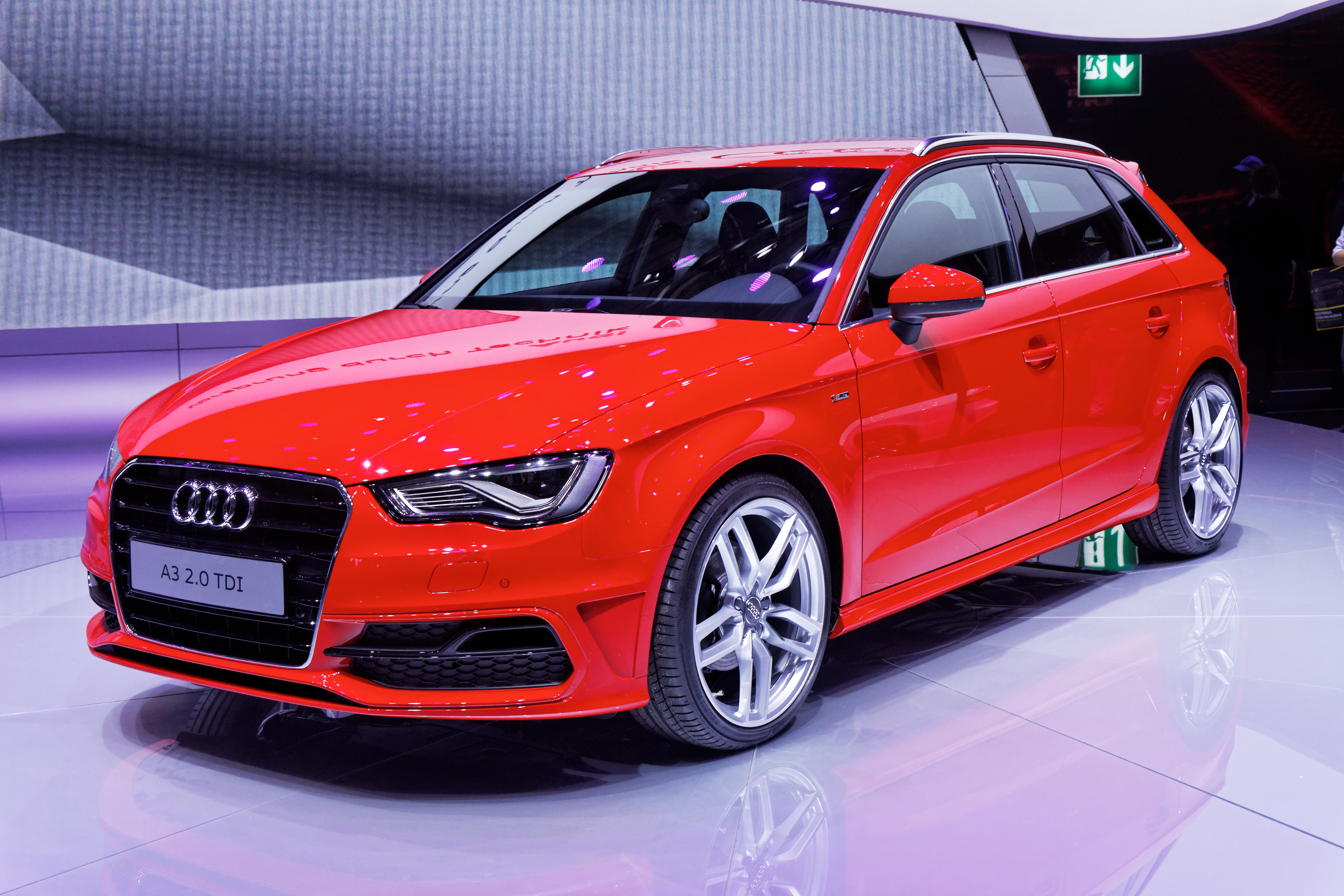 Une Audi A3 présentée lors du Mondial de l'Automobile de Paris 2012.